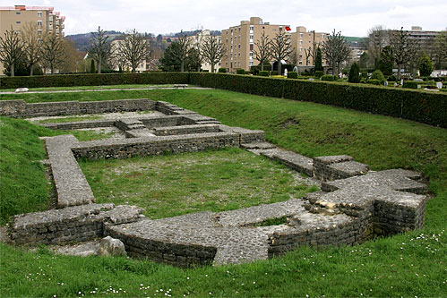 Yverdon: Castrum (Röm. Kastell) beim Friedhof